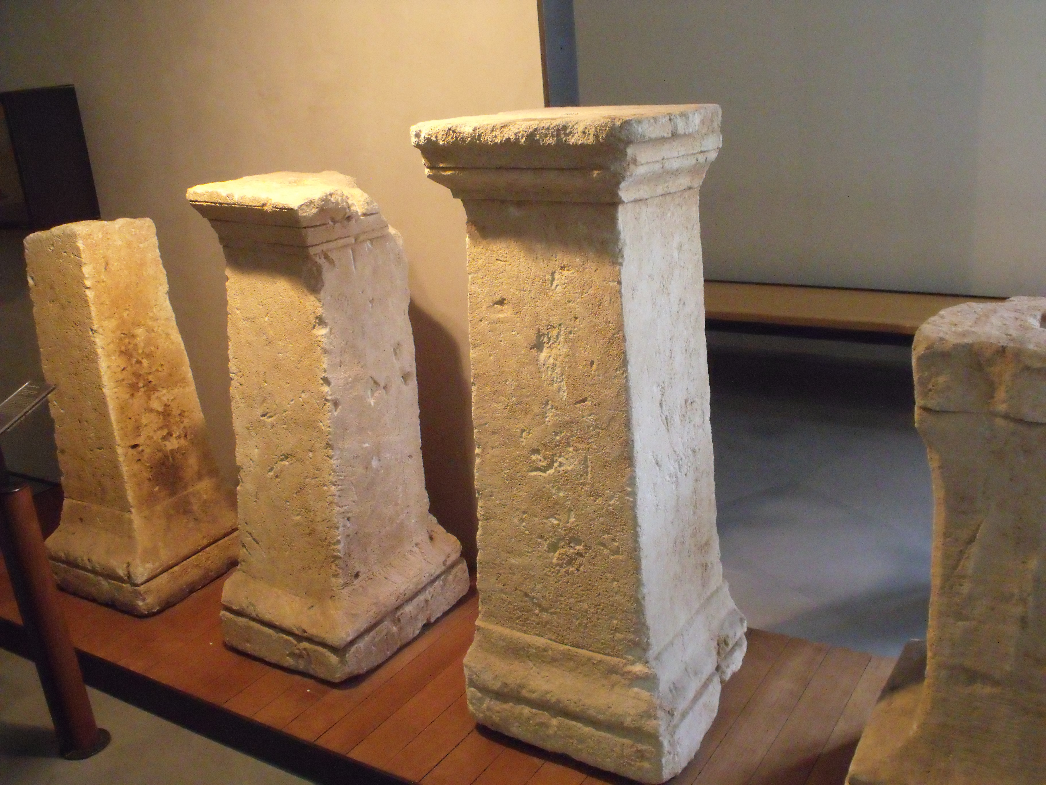 Stèles anépigraphes trouvées à l'Arcoule (Paradou, Bouches-du-Rhône). S'agit peut-être de support à des objets votifs. 2e moitié Ier s. av. J.-C.